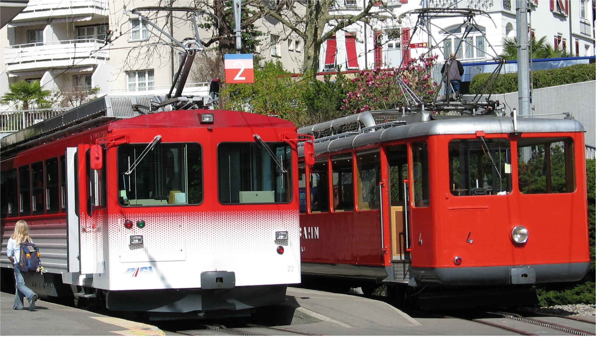 Op der Gare zu Vitznau.